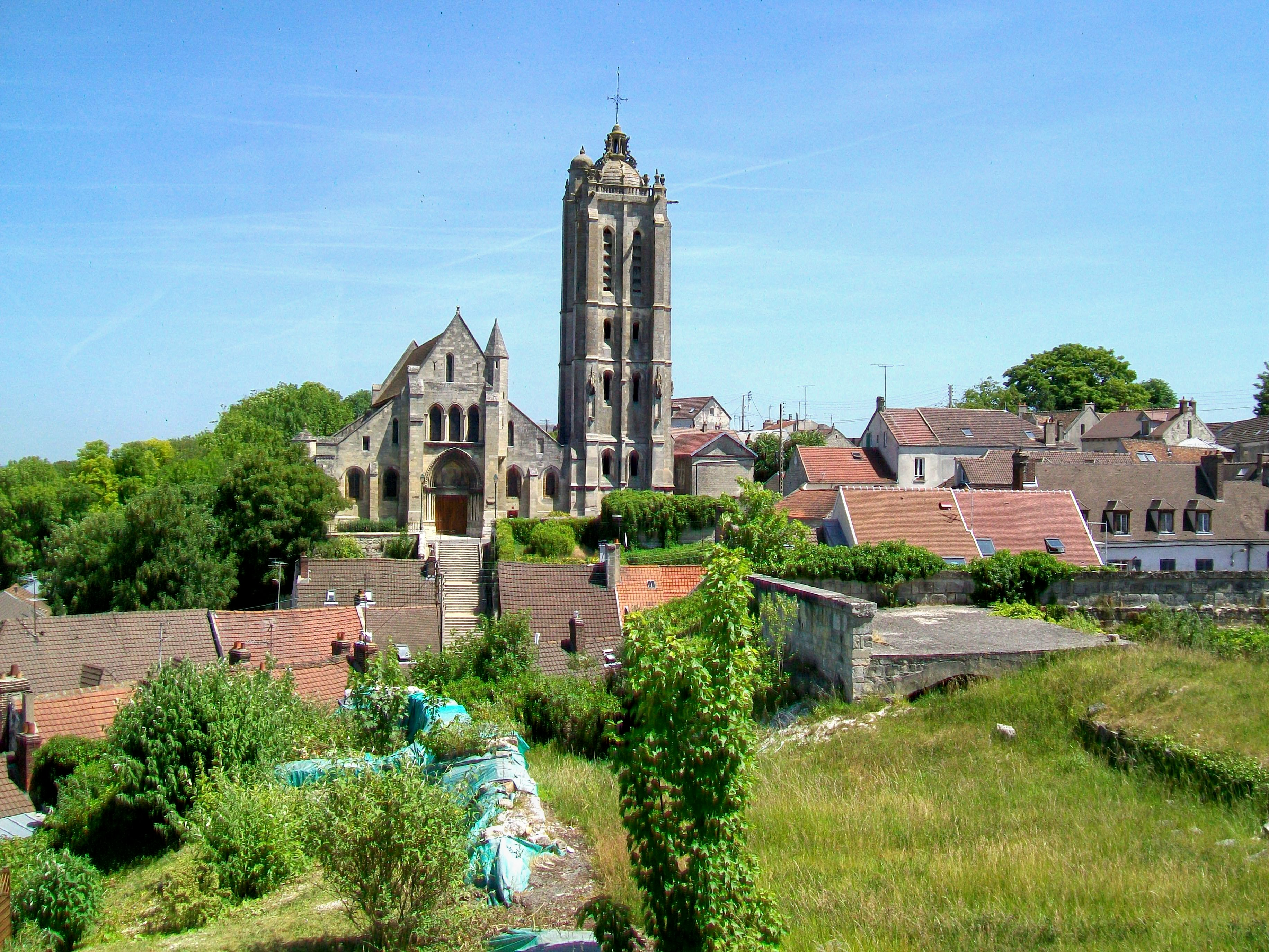 L'église Saint-Laurent de Beaumont-sur-Oise ; au premier plan, des vestiges du château.